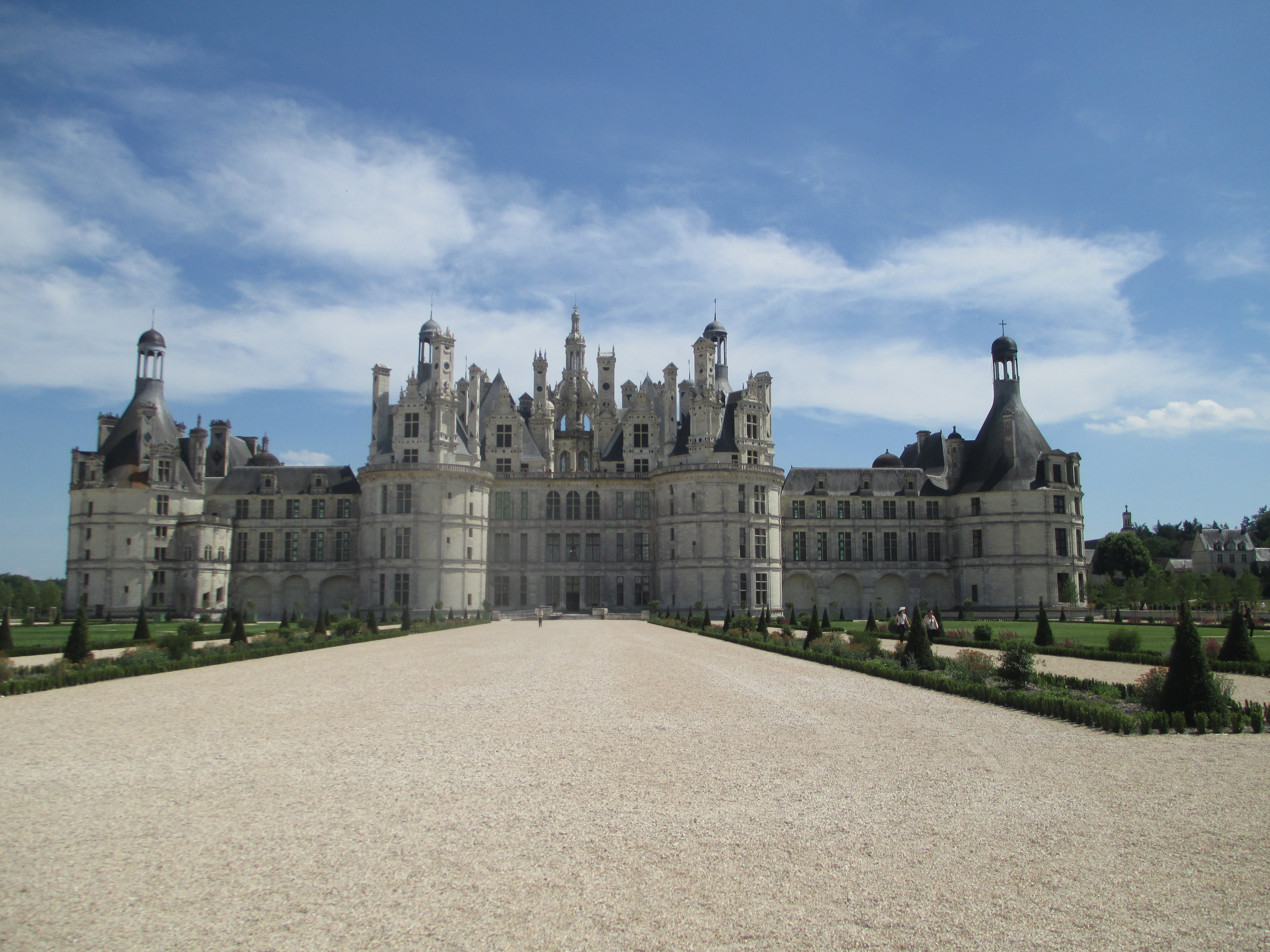 טירת שמבור